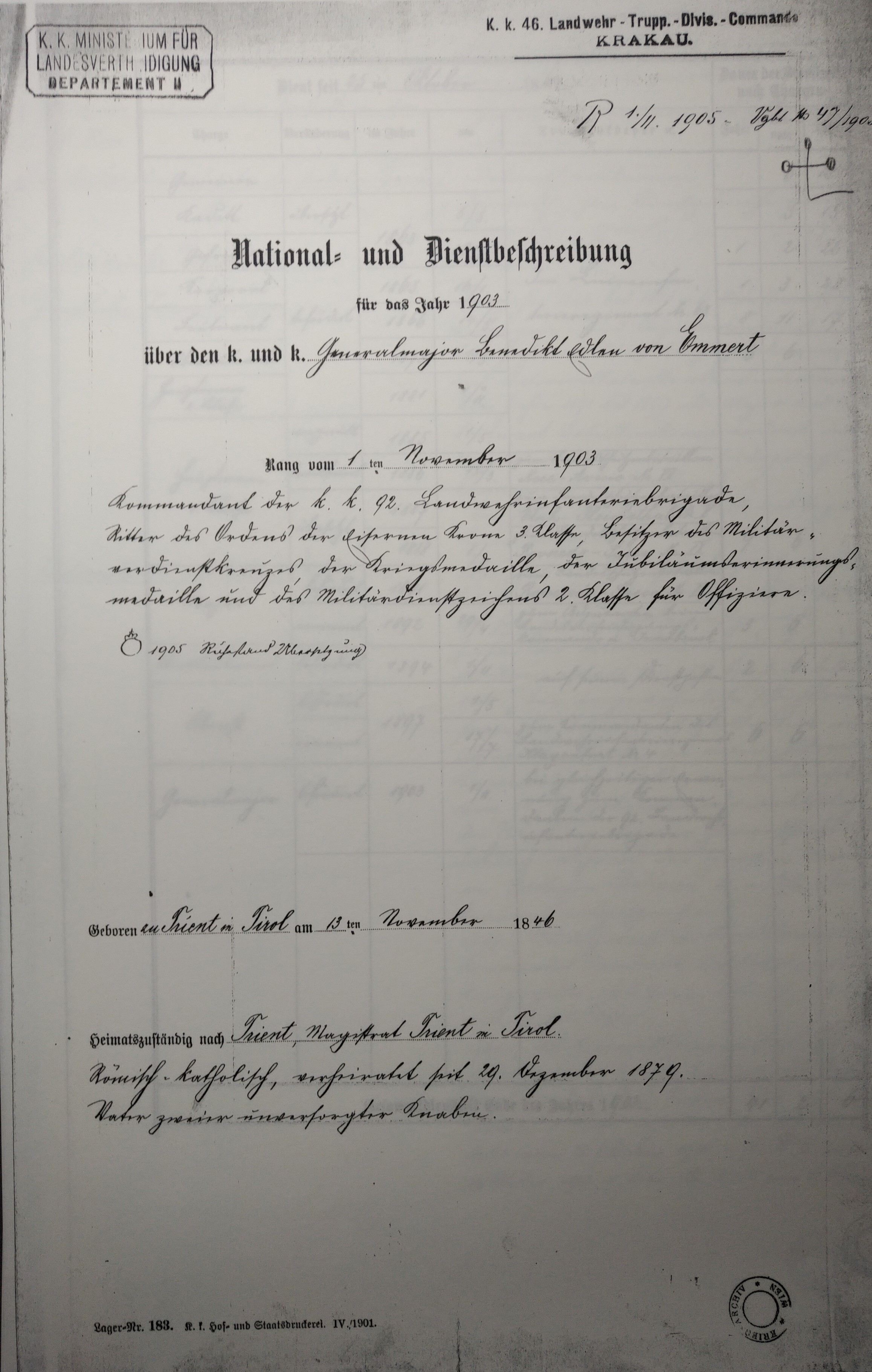 Archivní dokument: jmenování Benedikta Edlera von Emmerta generálmajorem k 1. 11. 1903.